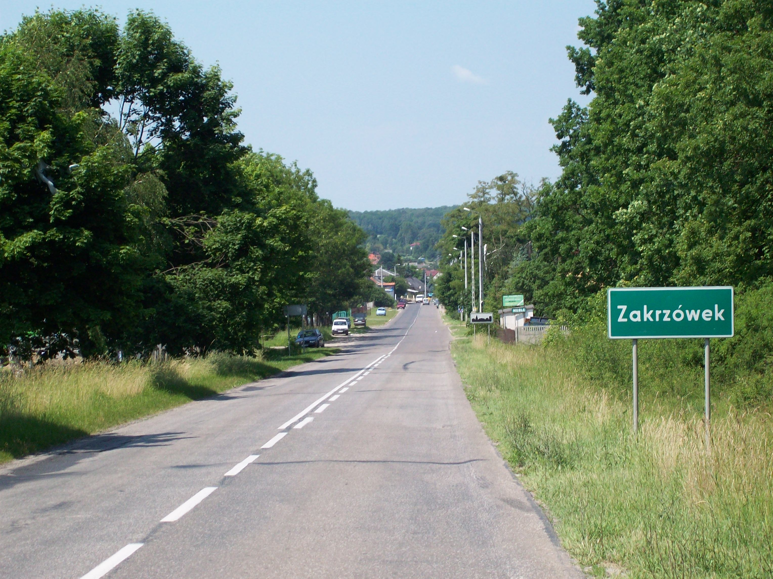 Widok na Zakrzówek z drogi wojewódzkiej nr 842 (wjazd do wsi od strony Krasnegostawu)